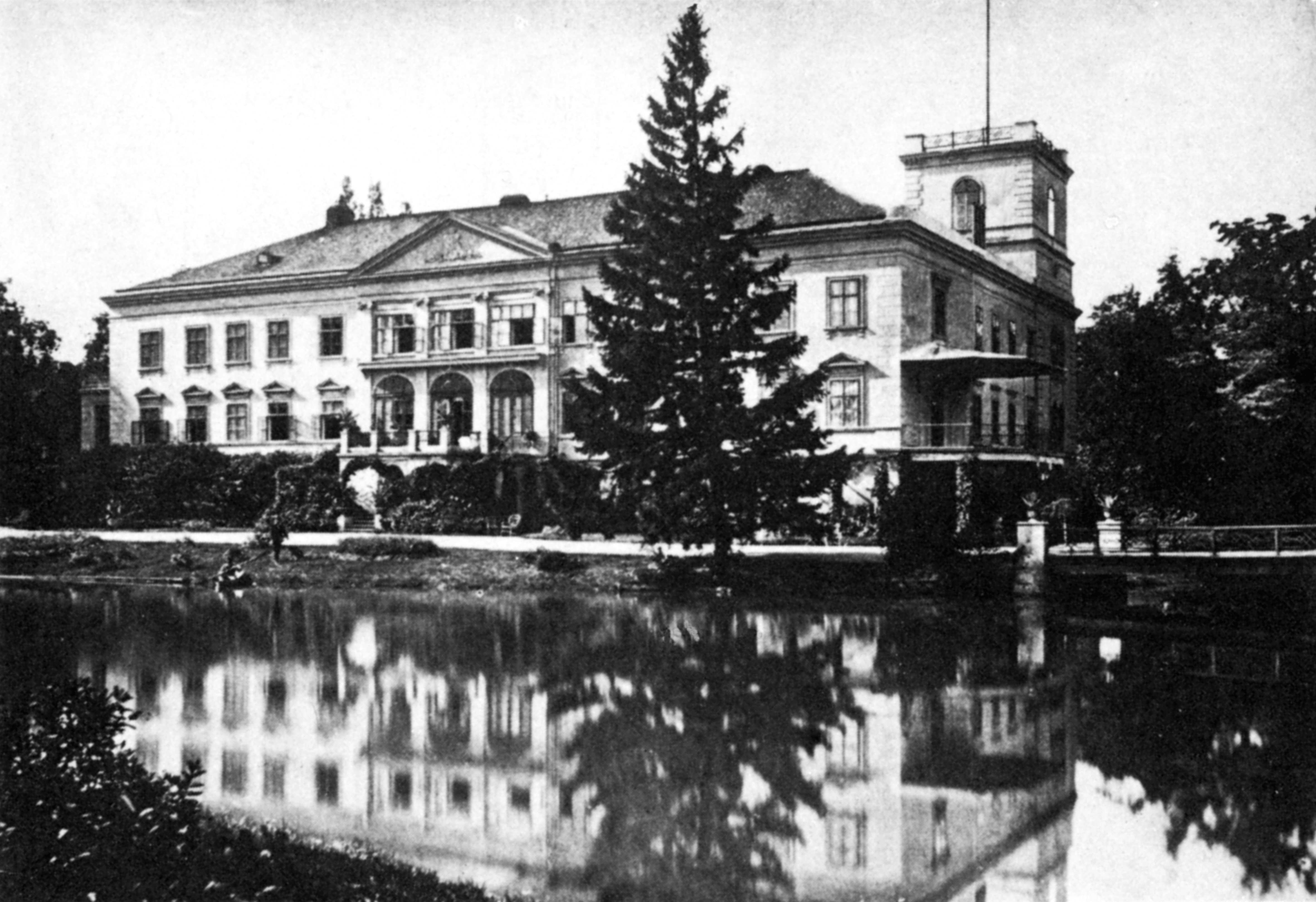 Schönau an der Triesting, Schloss vor 1896, ab 1813 zeitweise zugewiesener Exil-Wohnsitz von Jérôme Bonaparte (* 15. November 1784 in Ajaccio; † 24. Juni 1860 im Schloss Vilgénis bei Paris), ursprünglich Girolamo Buonaparte, war der jüngste Bruder Napoléon Bonapartes. Von 1807 bis 1813 war er König des Königreiches Westphalen, sein offizieller Königsname dort war Jérôme Napoleon (JN) bzw. Hieronymus Napoleon (HN).